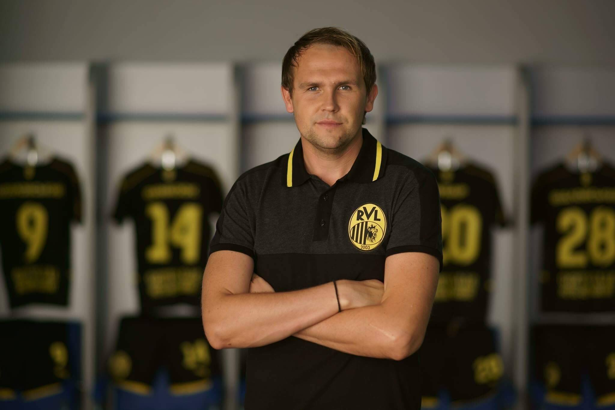 Лапіцький Володимир Георгійович, спортивний директор ФК "Рух" (Винники)